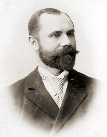 Степа́н Йо́сипович Сма́ль-Сто́цький (* 8 або 9 січня[1] 1859, Немилів, Радехівський район, Львівська область — † 17 серпня 1938[1], Прага) — український мовознавець і педагог, літературознавець (один із перших теоретиків українського віршування)[2]; визначний громадсько-політичний, культурний, економічний діяч Буковини. Один із засновників Музею визвольної боротьби України у Празі.